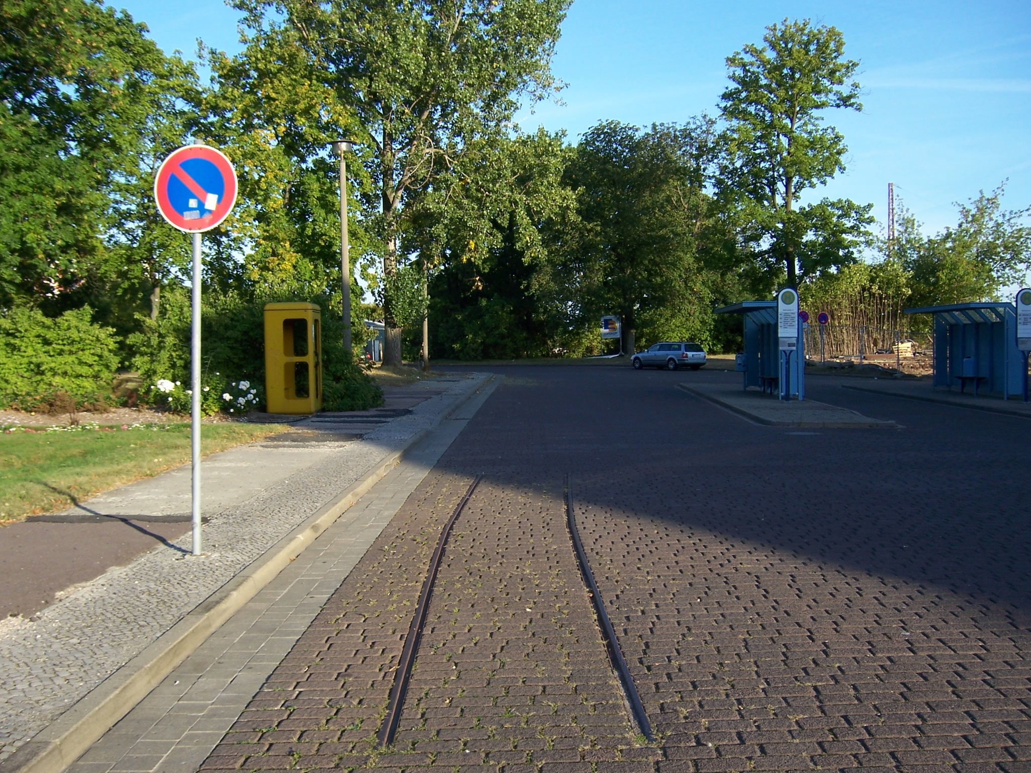 Zerbst, historisches Gleis der Pferdestraßenbahn am Bahnhof